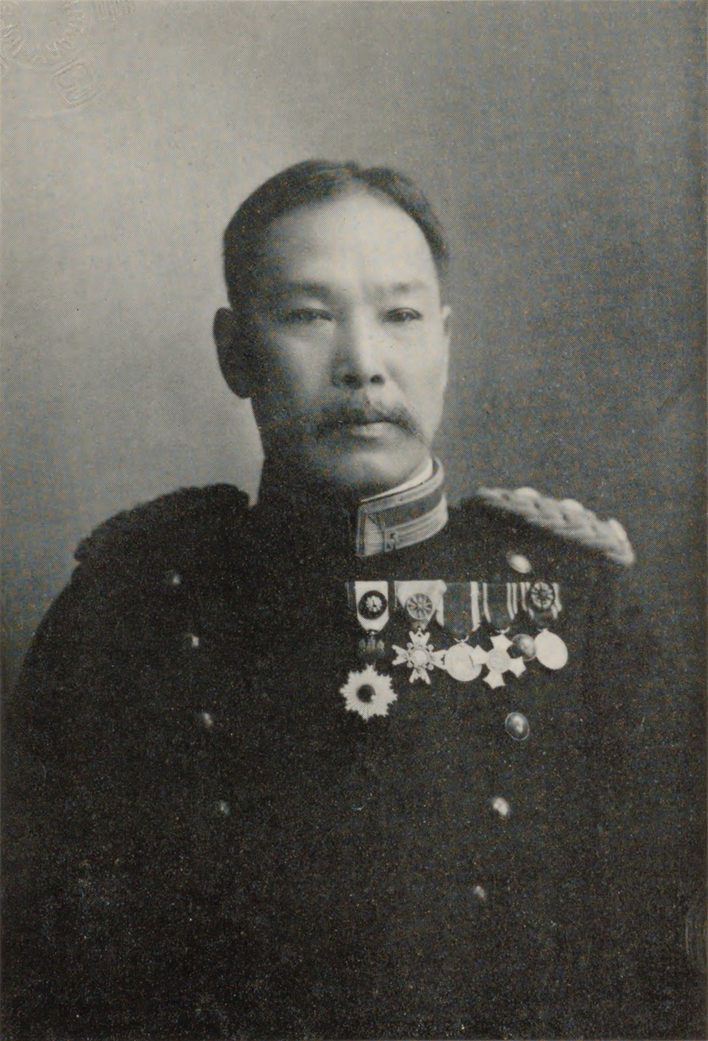 Portrait of Anraku Kanemichi (安楽兼道, 1851 – 1932)